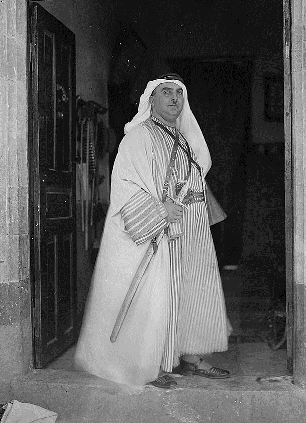 עארף אל-עארף